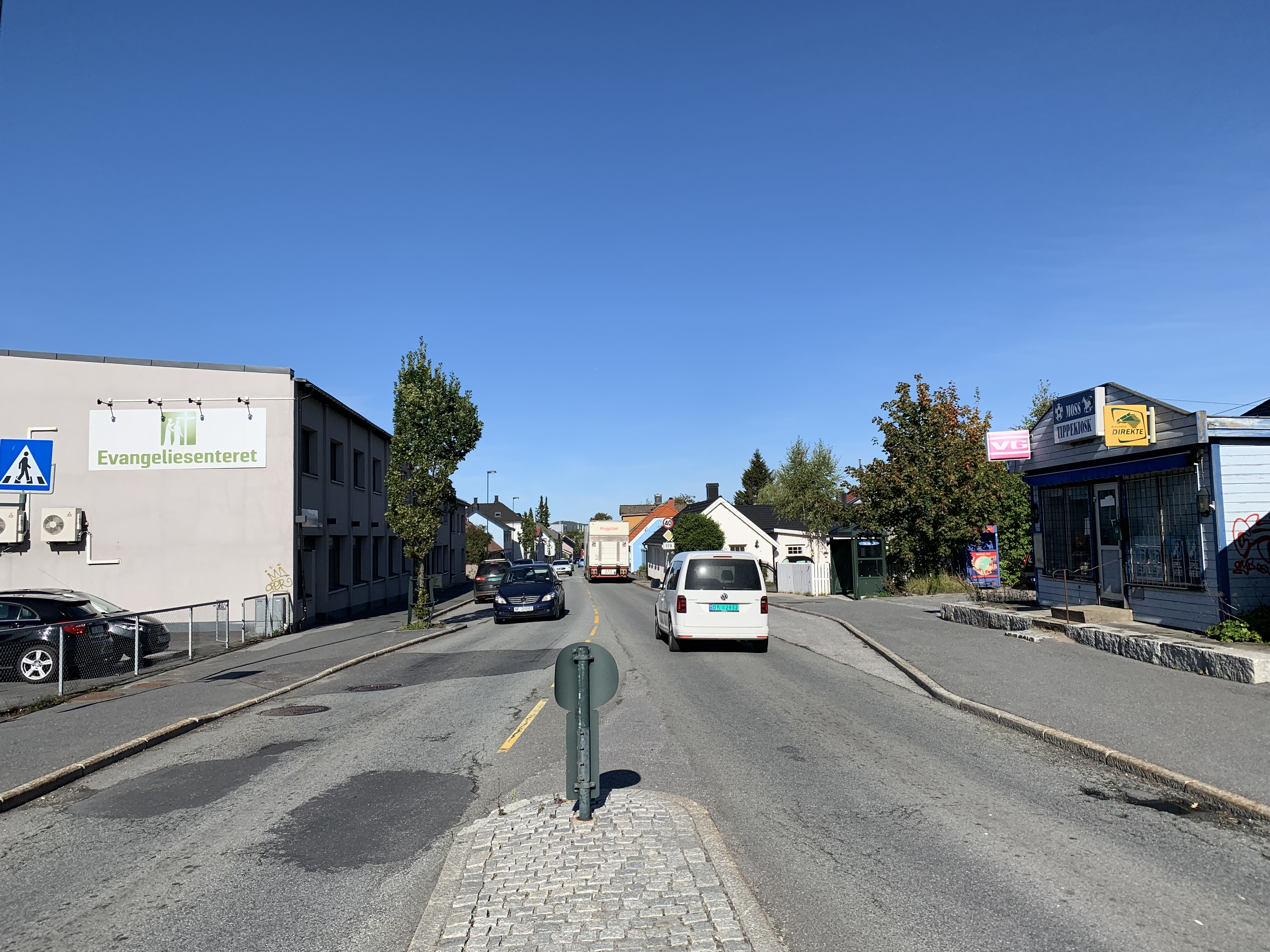 Dette er et bilde av gaten og bygninger.